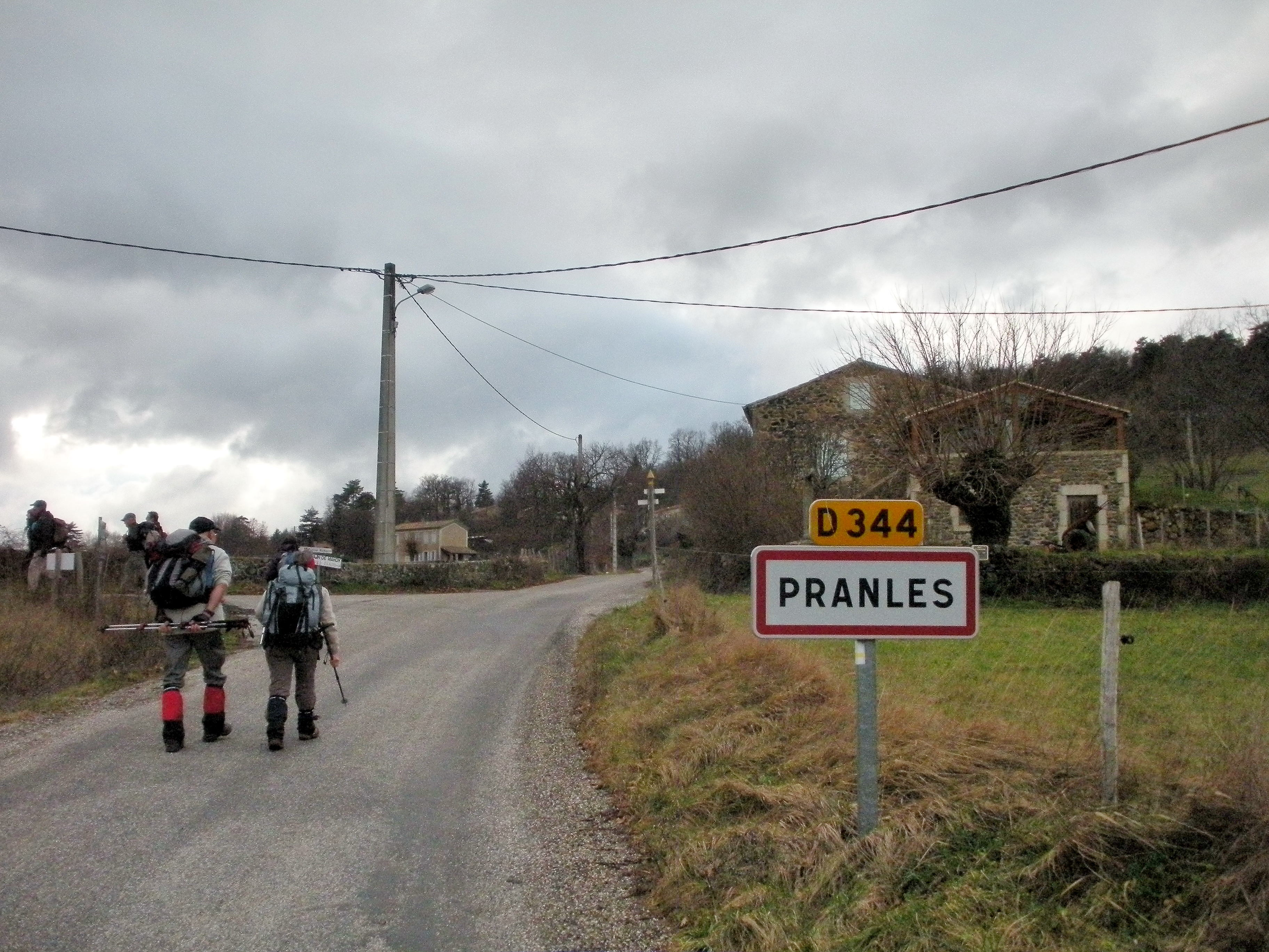 entrée du village de Pranles